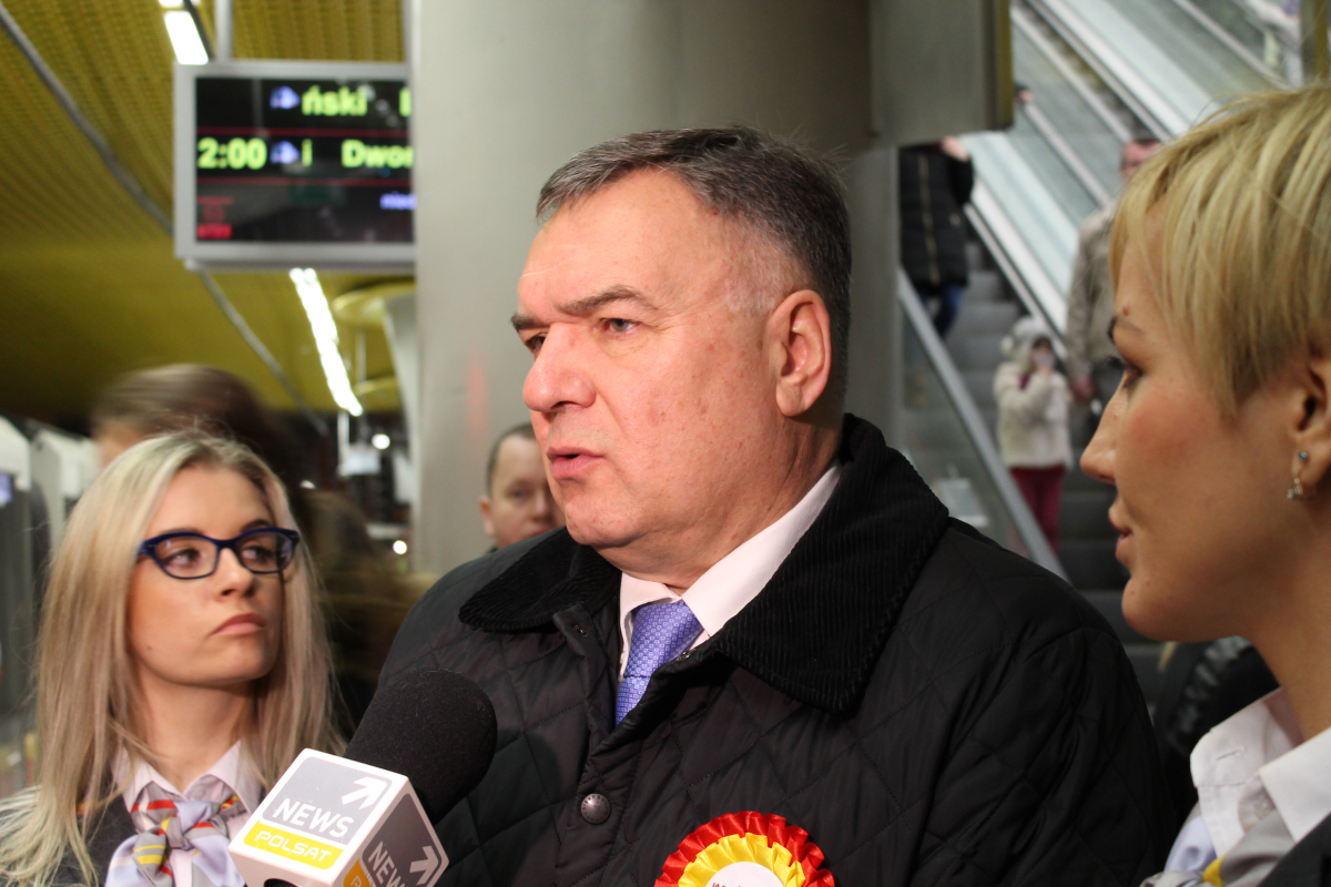 Prezes Metra Warszawskiego Jerzy Lejk udziela wywiadu mediom na peronie stacji C11 Świętokrzyska.